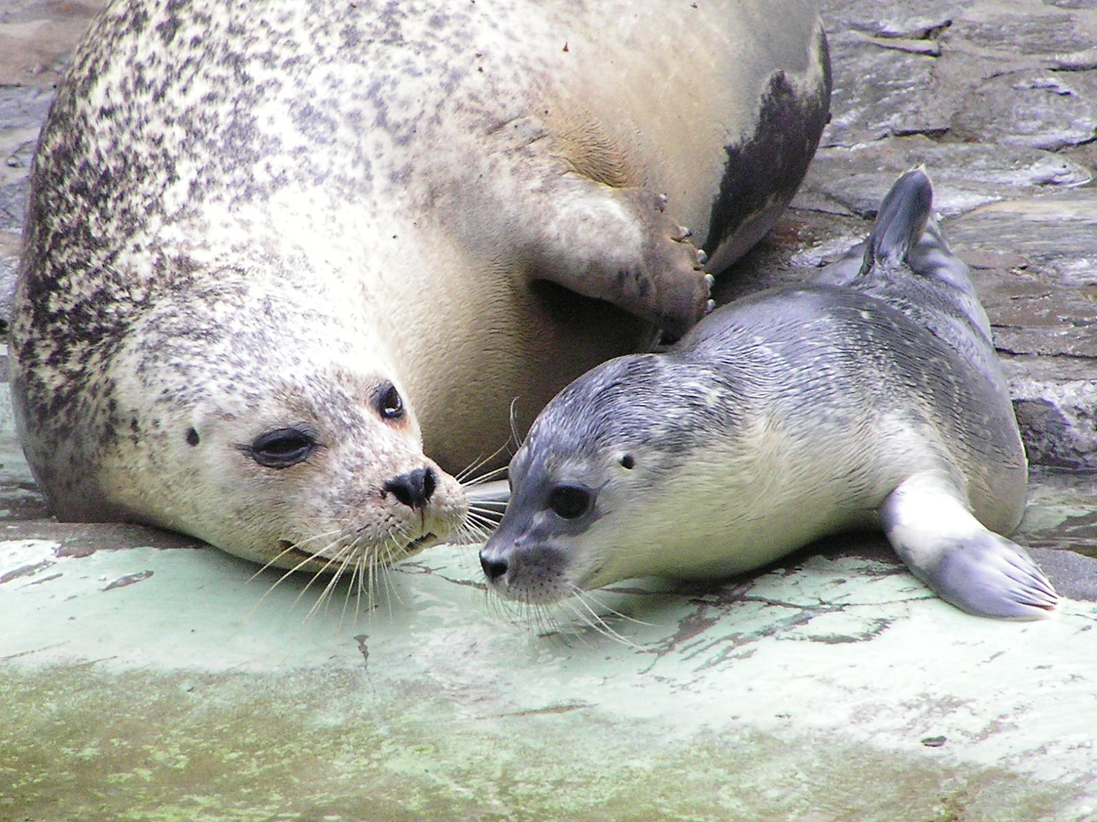 Seals at Antwerp zoo